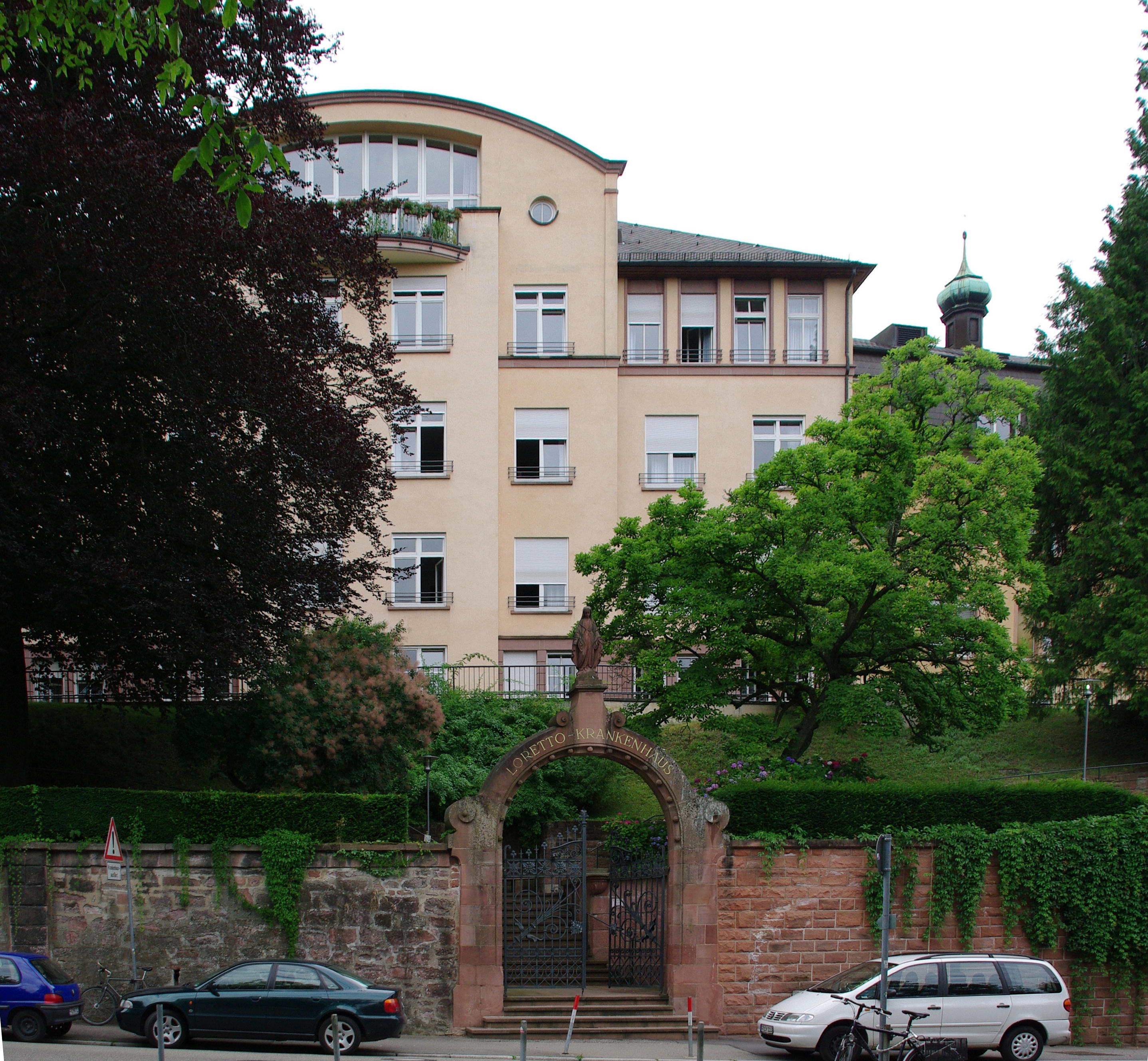 Haupteingang Lorettokrankenhaus Freiburg